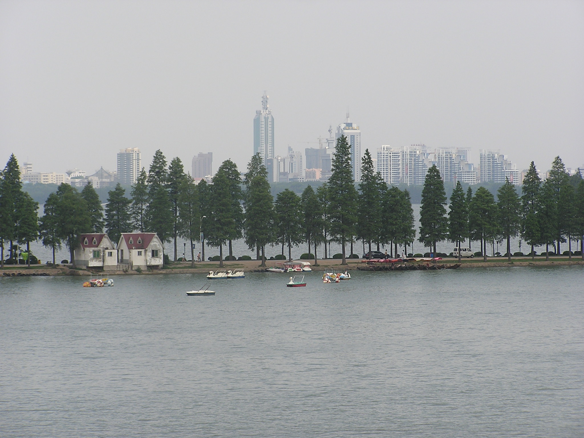 Ostsee in Wuhan - East Lake in Wuhan